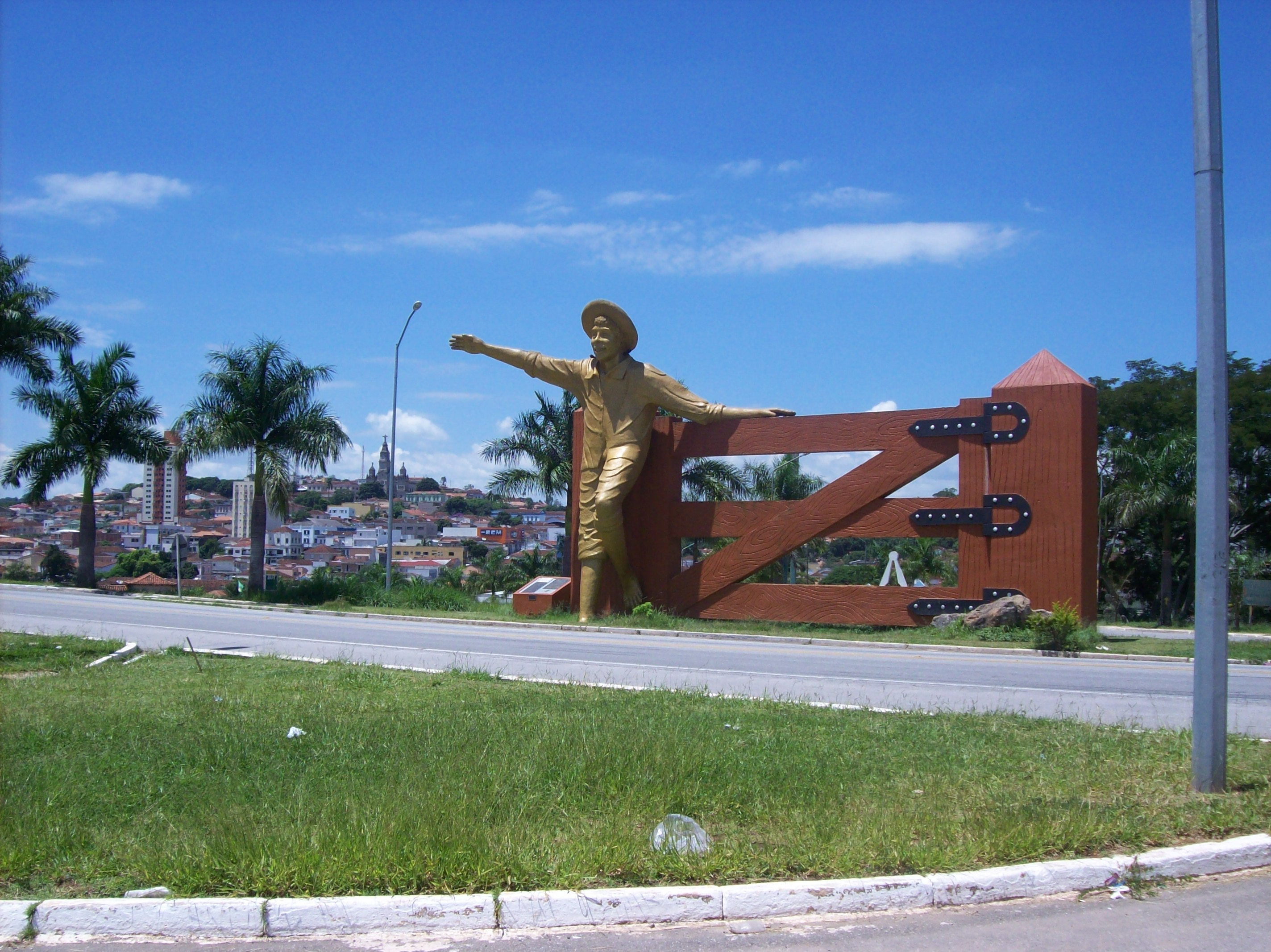 Trevo de Ouro Fino